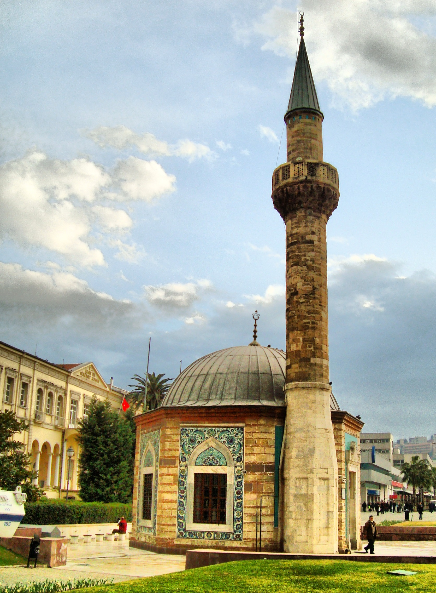 konak meydanı-İzmir